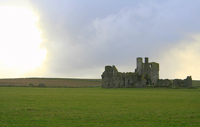 Contre-jour at Pittulie Castle